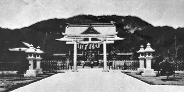 中文（台灣）: 高雄神社位於壽山山腰，啟建於西元1928年（昭和3年），而於翌年完工，供奉日神大物主尊、崇德天皇及能久親王。二戰後改建為今之忠烈祠，供奉國民革命先烈靈位。